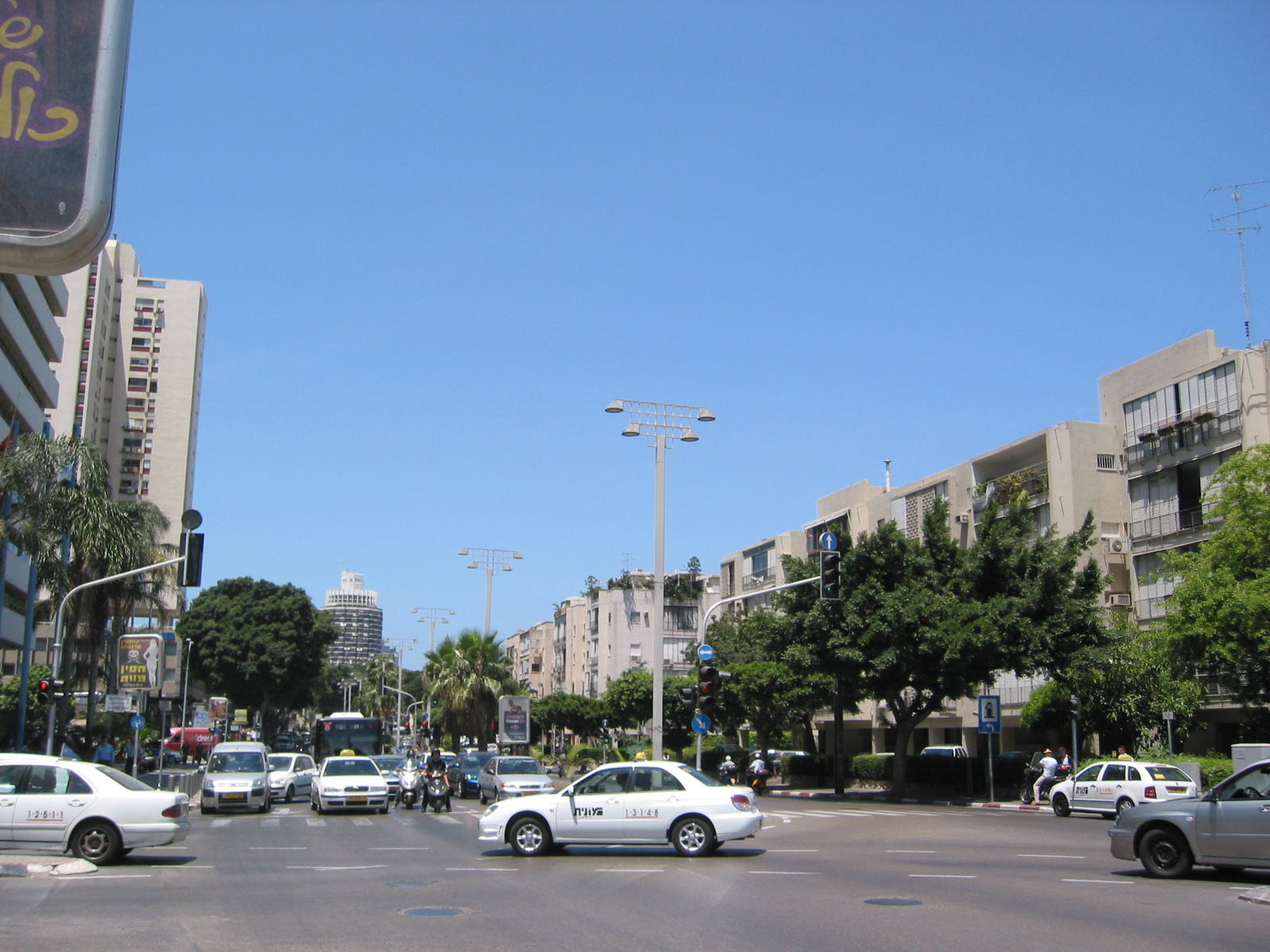 Shaul Hamelech Street, Tel Aviv